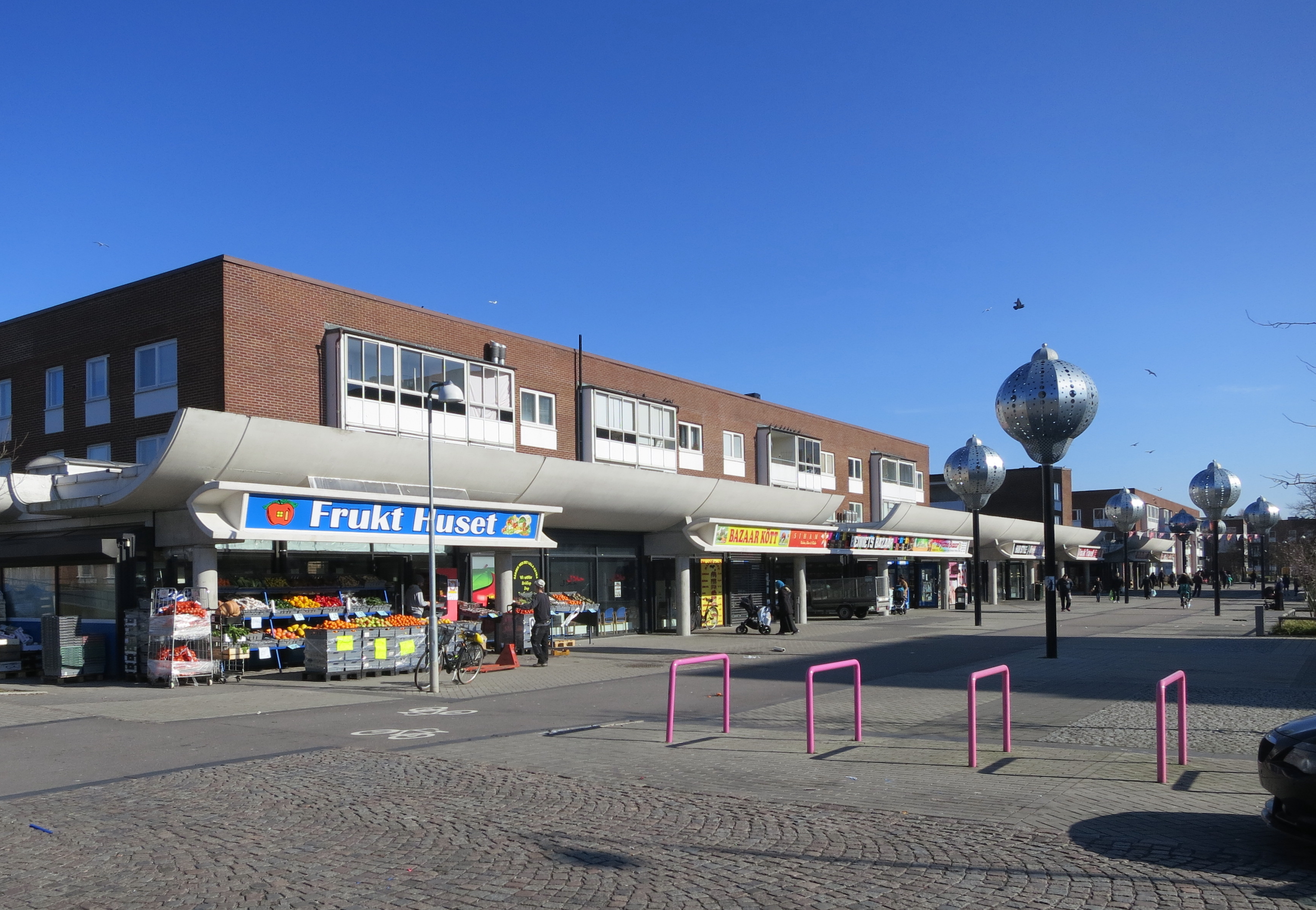 Örtagårdens affärsgata, Malmö